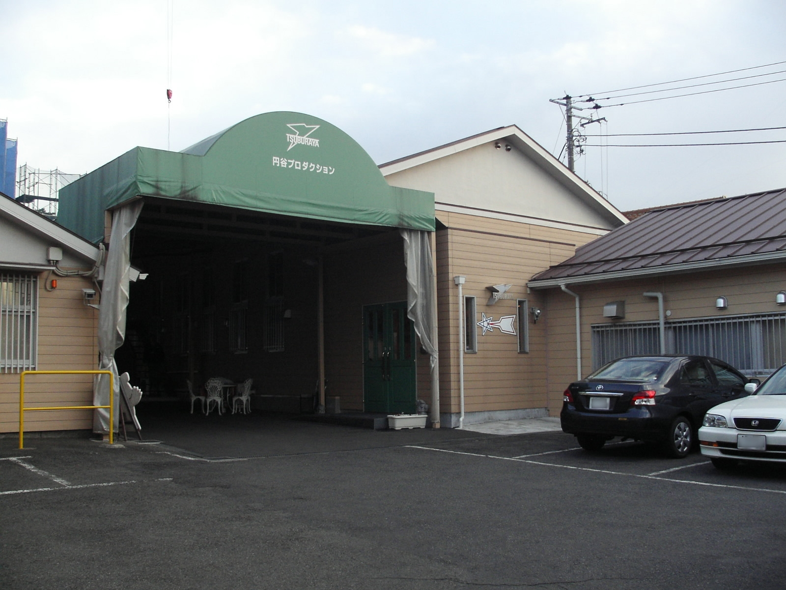 “Tsuburaya Productions” Kinuta, Setagaya-ku, Tokyo 東京都世田谷区砧にかつて存在した円谷プロダクション旧本社社屋。